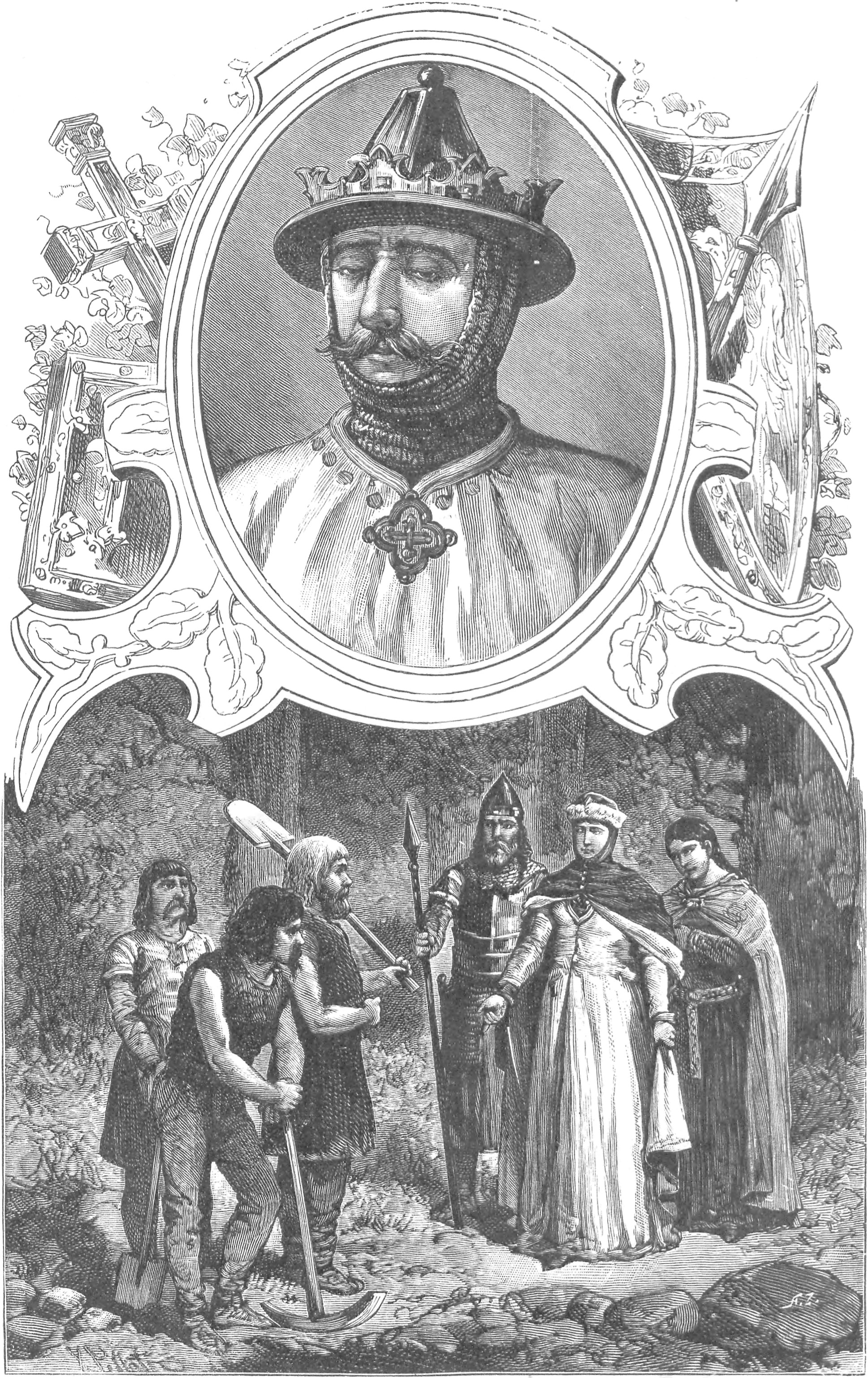 ilustracja z książki „Wizerunki książąt i królów polskich“